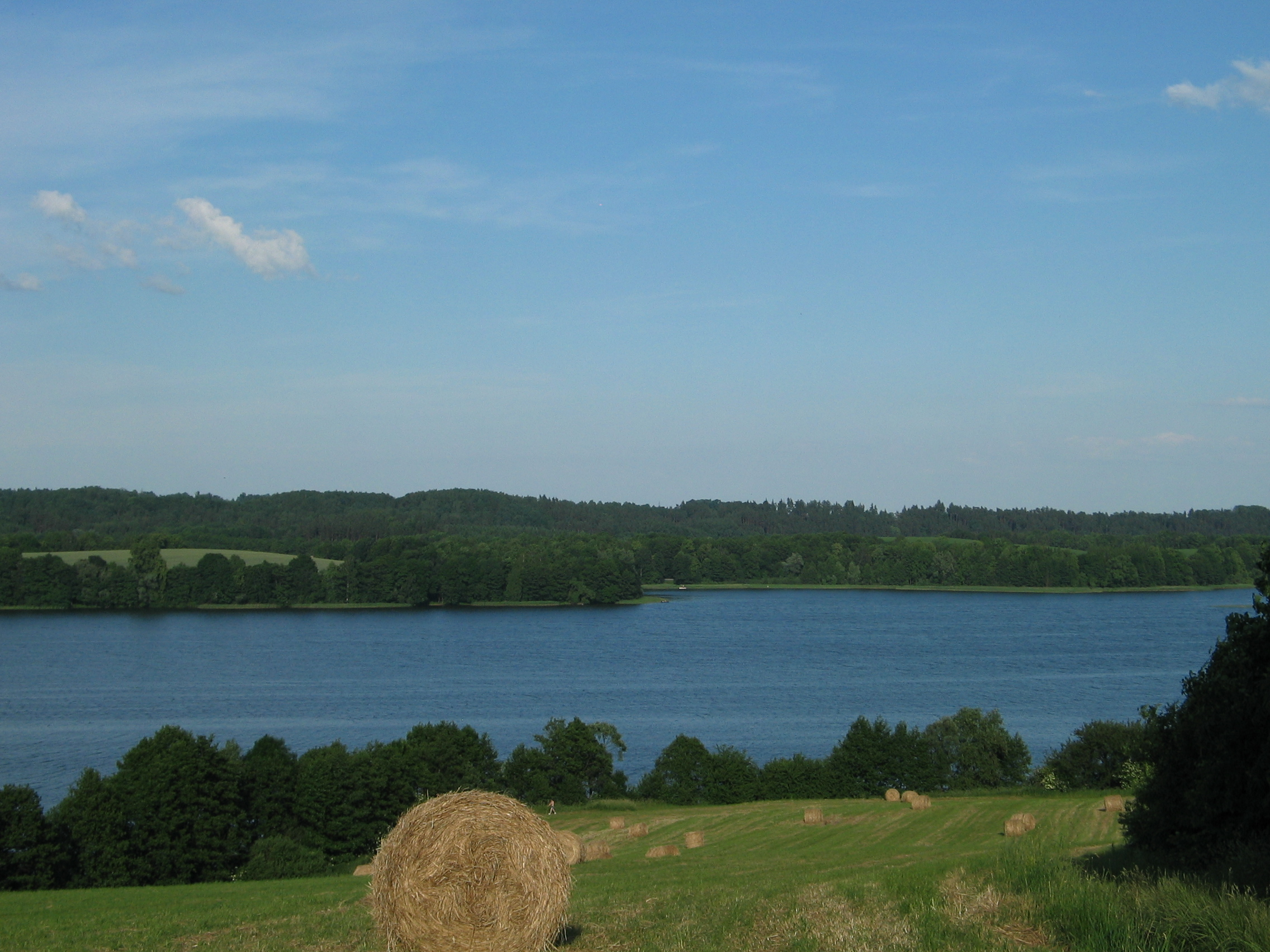 Widok na jezioro Juno w Mrągowie